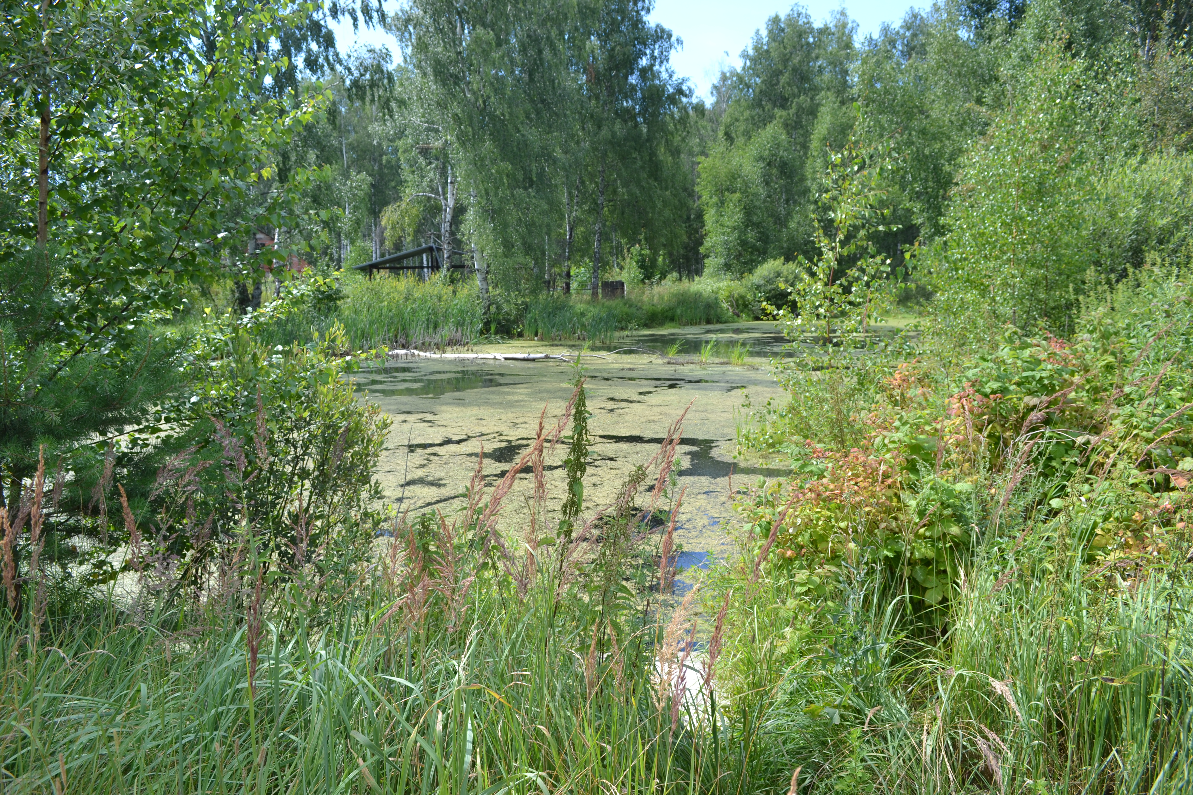 Пруд в деревне Дубасово (Шатурский район)